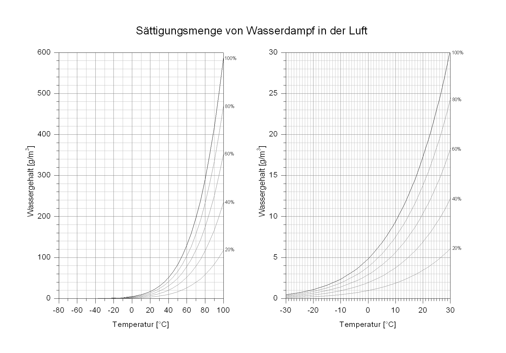 Wasserdampf-Sättigungskurven